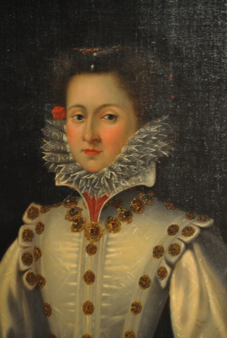 Polyxena z Pernštejna